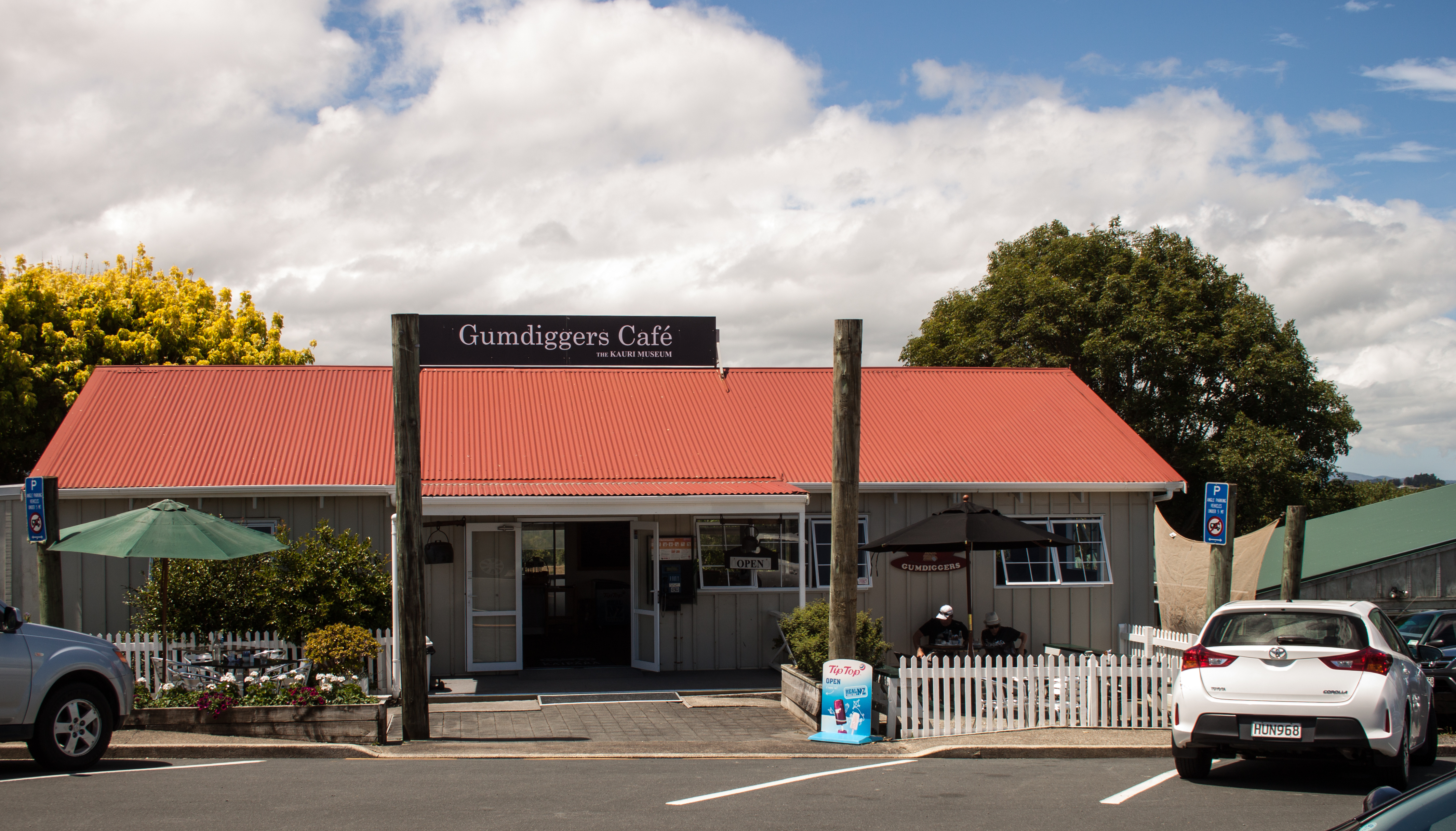 Matakohe, Cafe